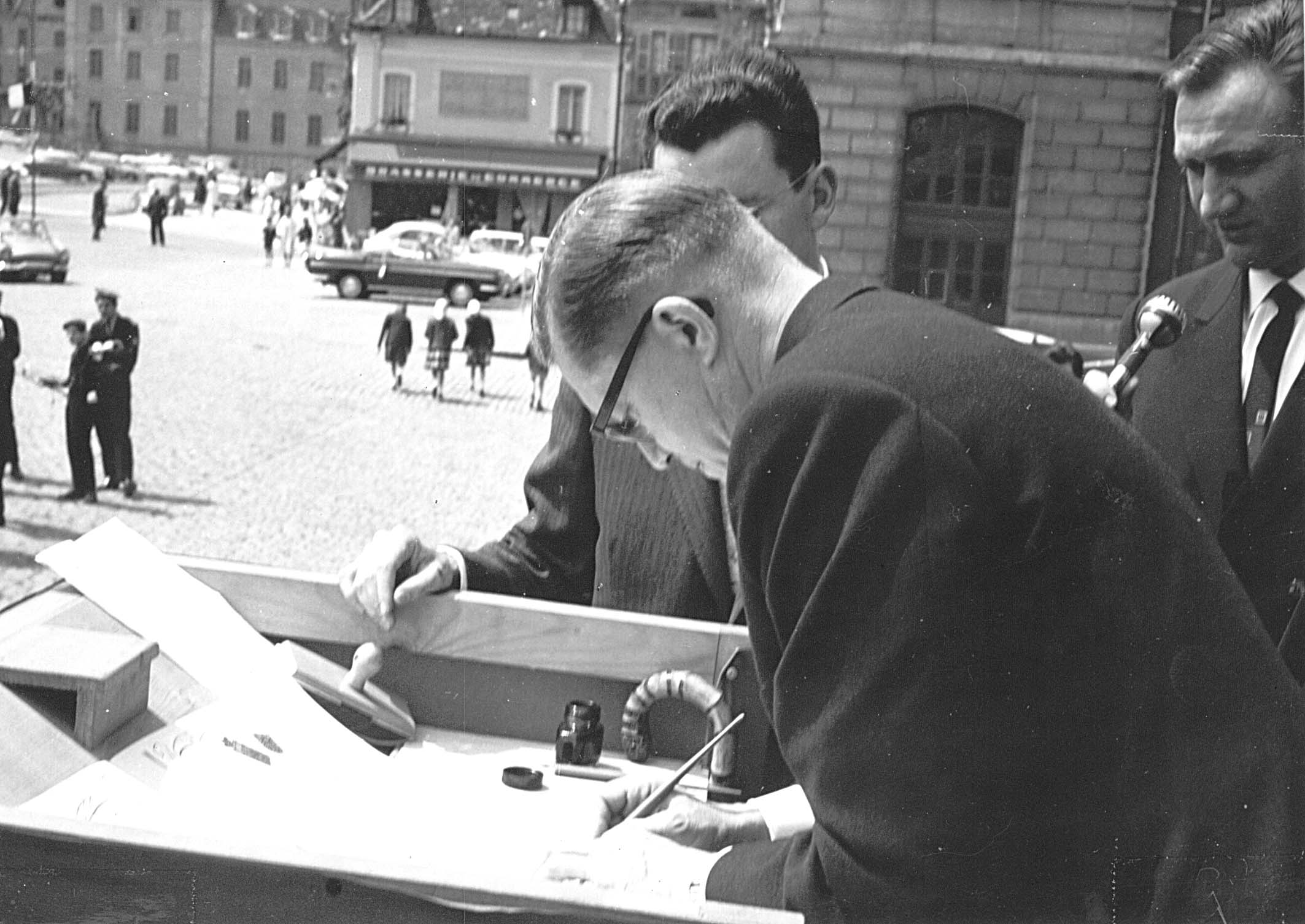 Der damalige Bürgermeister Heinz Kühn bei der Unterzeichnung der Urkunde zur Städtepartnerschaft zwischen Ingelheim und Autun in Autun im Jahr 1963.